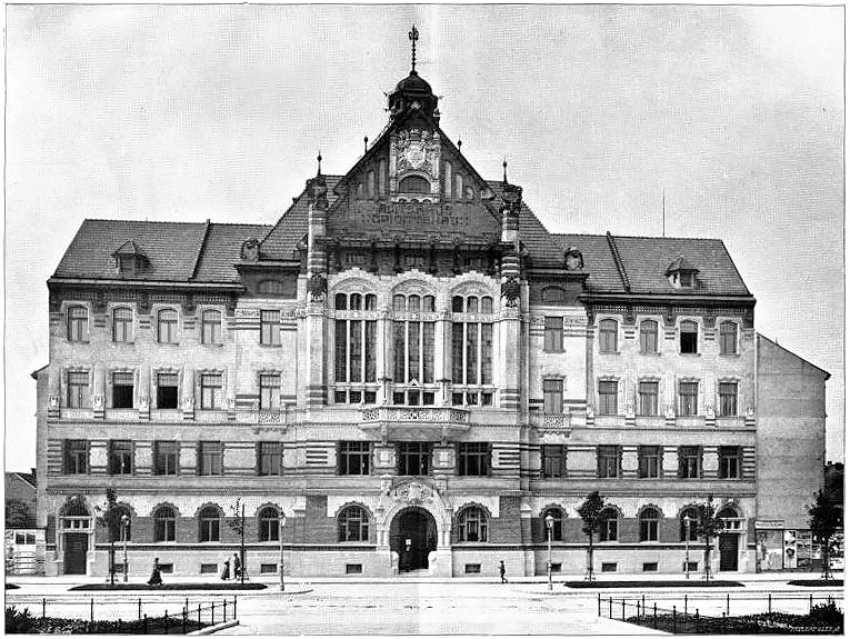 Wien, Amtshaus Brigittenau (20. Wiener Gemeindebezirk), Brigittaplatz 10; Architekt: Karl Badstieber (1875–1942)